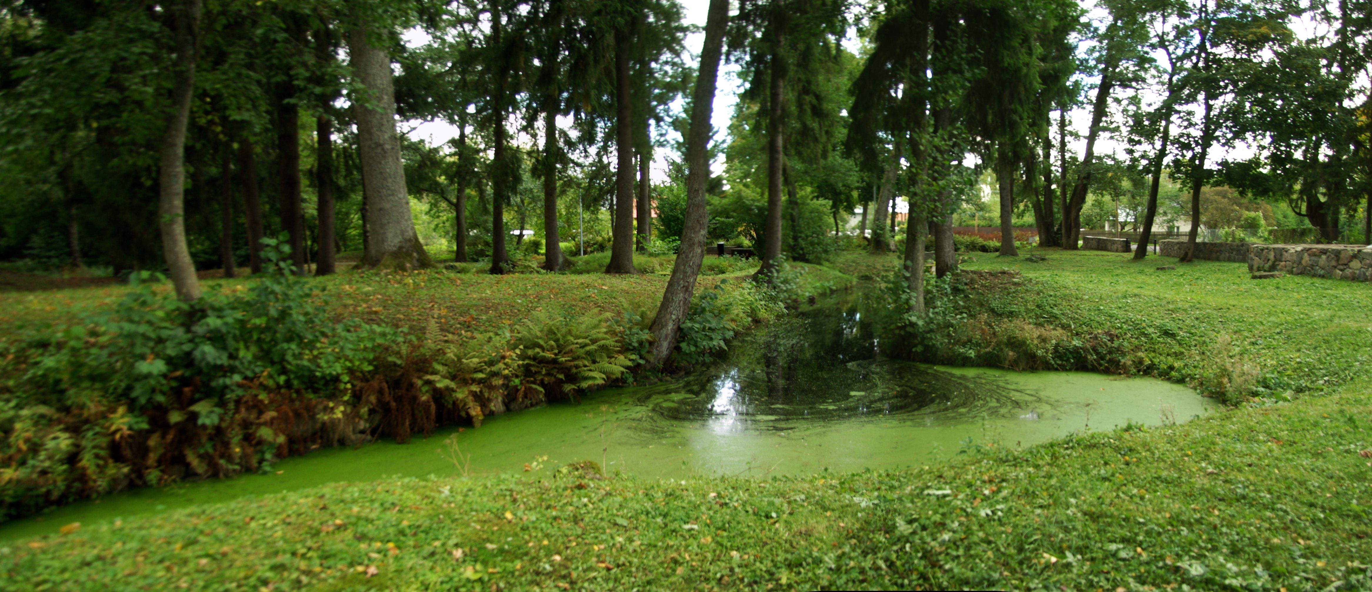 Harju maakond, Tallinna linn, Nõmme linnaosa Lossi tn 13a